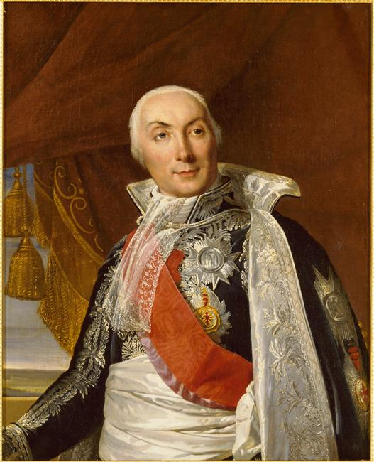 Historien et sénateur - en grand costume de Grand-Maître des Cérémonies du premier Empire